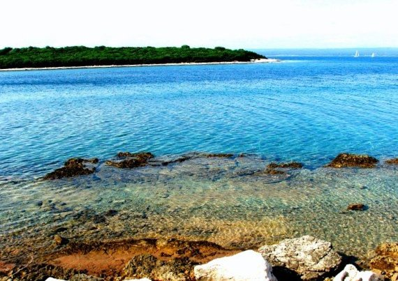 Национални парк Бријуни, моја слика